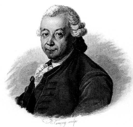 Pierre Poivre (1719-1786) agronome français